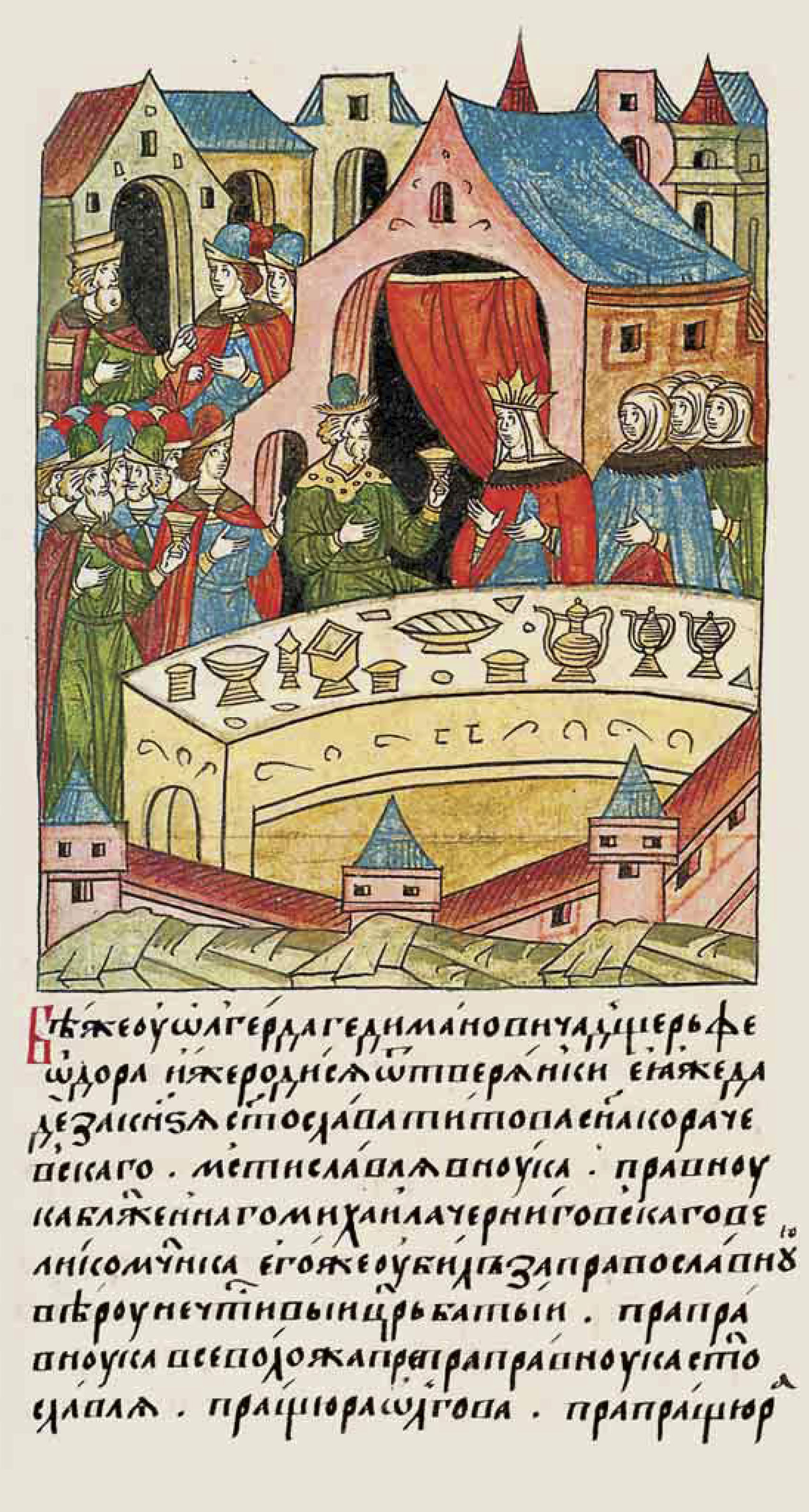 ЛИЦЕВОЙ ЛЕТОПИСНЫЙ СВОД Была у Ольгерда Гедиминовича дочь Феодора, рожденная от тверитянки, ее выдали за князя Святослава, сына Тита Корачевского, внука Мстислава, правнука блаженного великомученика Михаила Черниговского, которого убил за православную веру нечестивый царь Батый, праправнука Всеволода, препраправнука Святослава, пращура Олега, прапращура [Святослава, препрапращур Яросла]